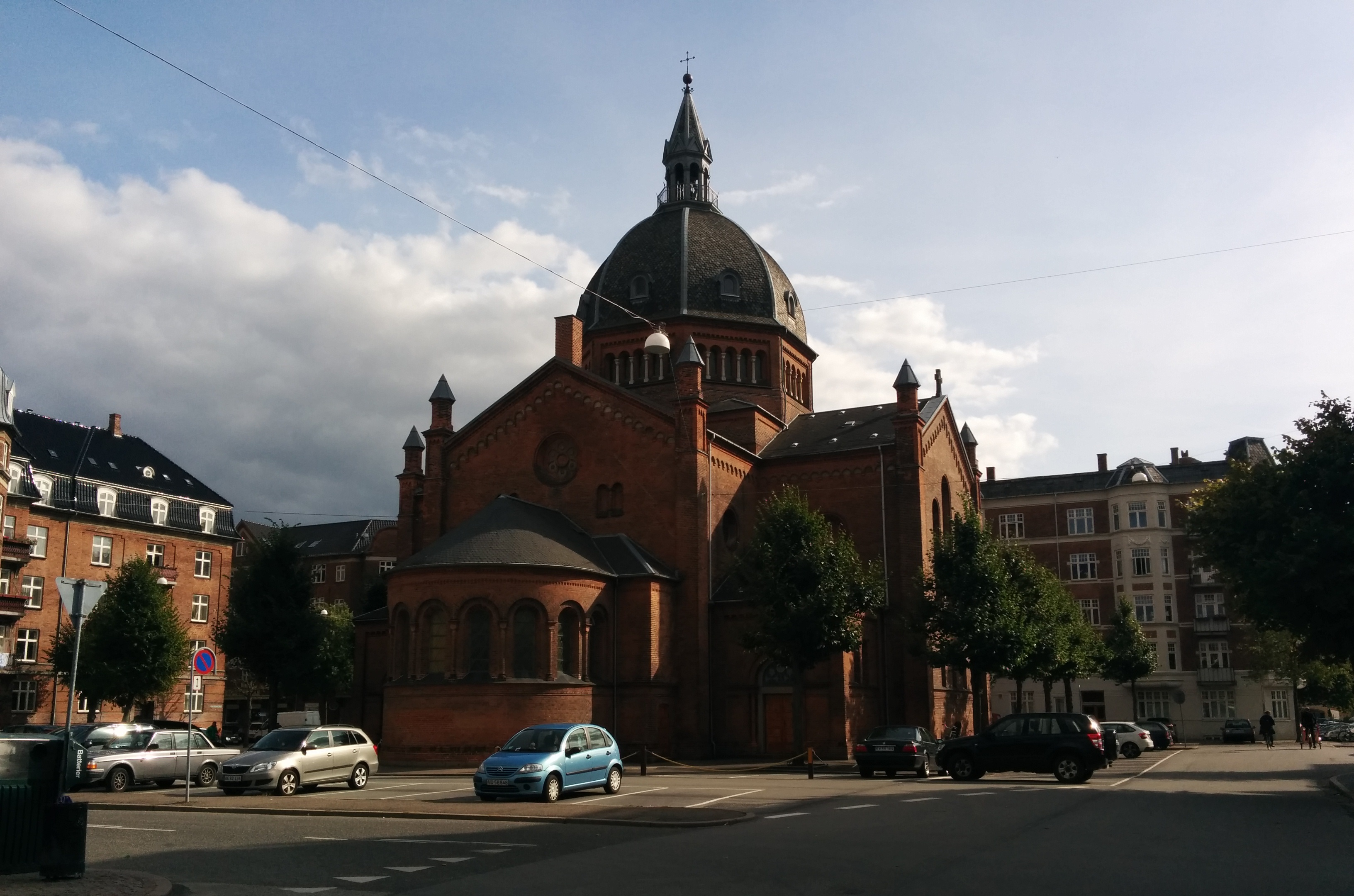 Sankt Markus Kirke, Frederiksberg, Copenhagen, Denmark